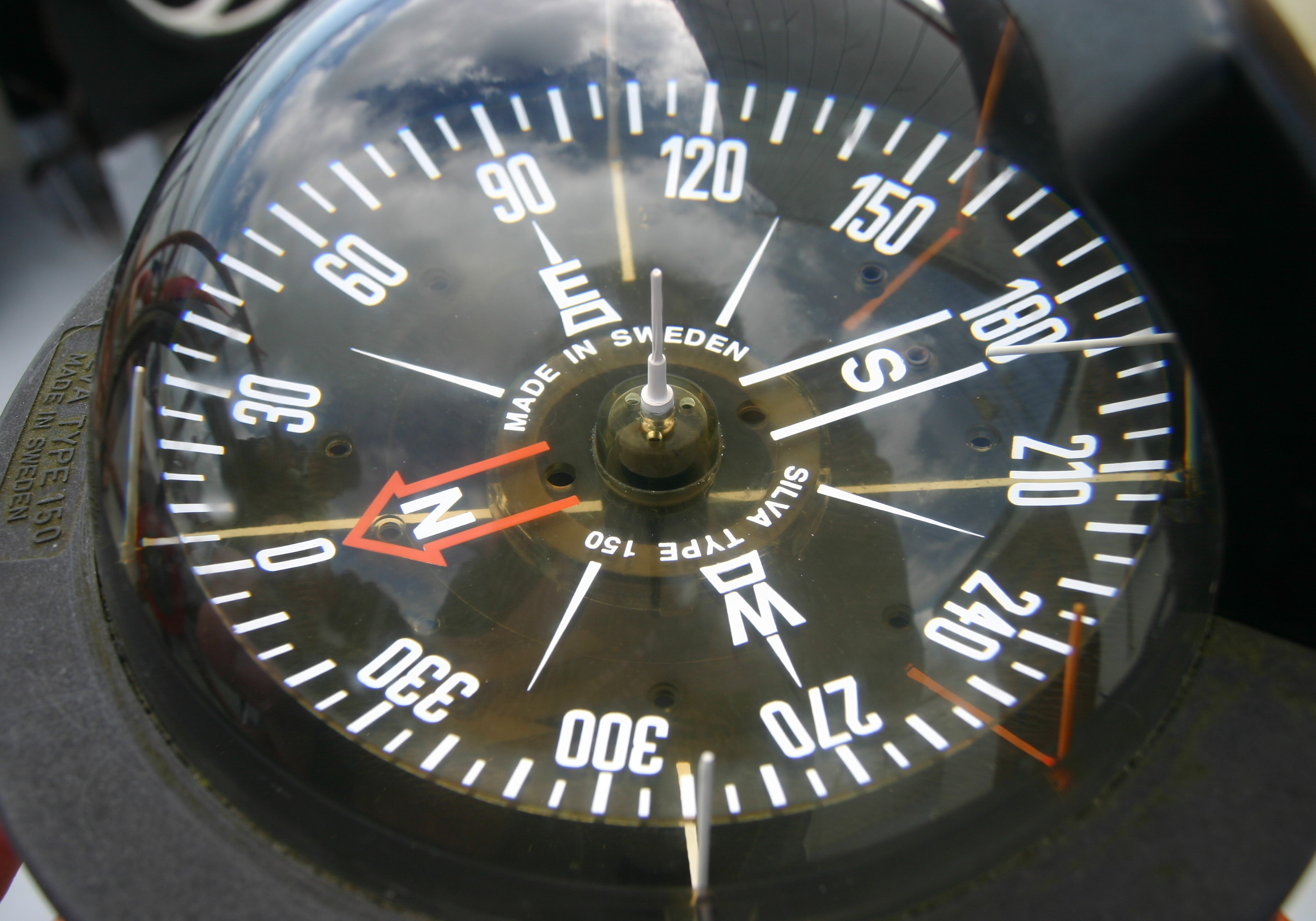 Scheepskompas van de klipper Averechts